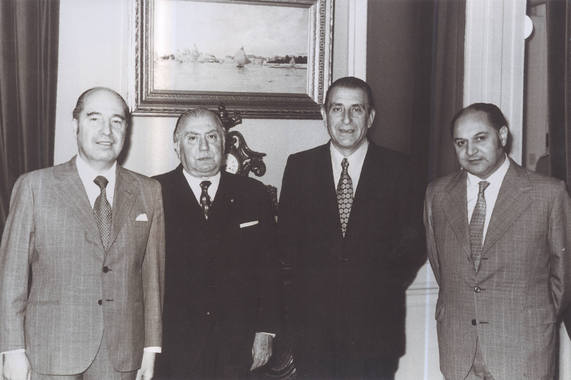 Gustavo Lorca, Humberto Aguirre Doolan, Eduardo Frei y Luis Pareto; políticos chilenos